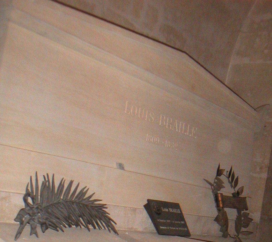 Tombeau de Louis Braille (1809-1852) in the Panthéon de Paris, France. Photo taken in 1997.